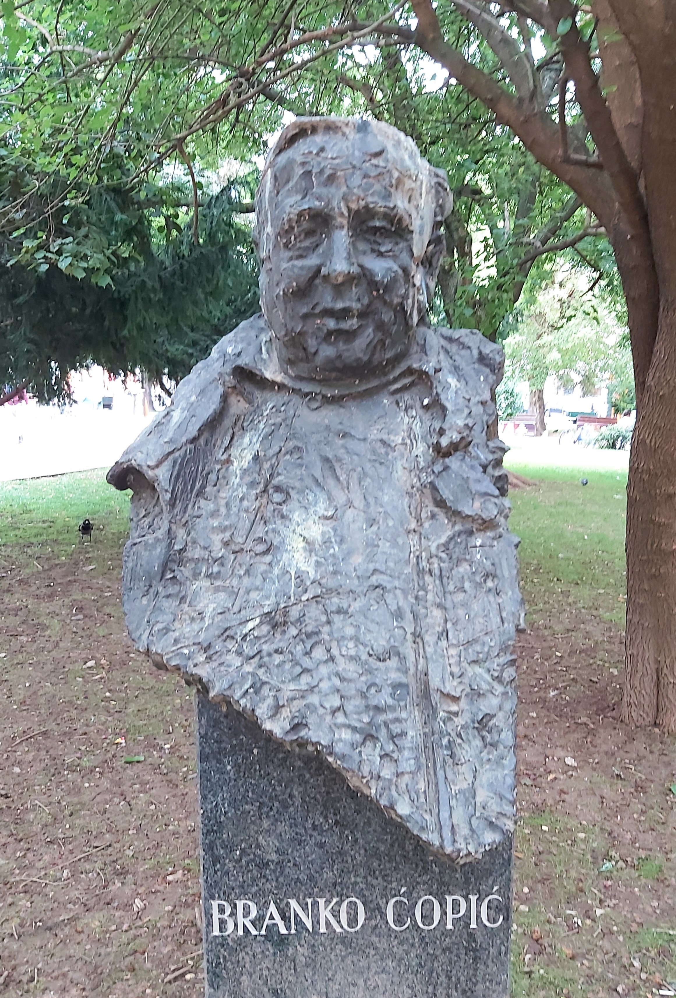 Branko Ćopić, bista, Trg Oslobođenja - Alija Izetbegović, Sarajevo